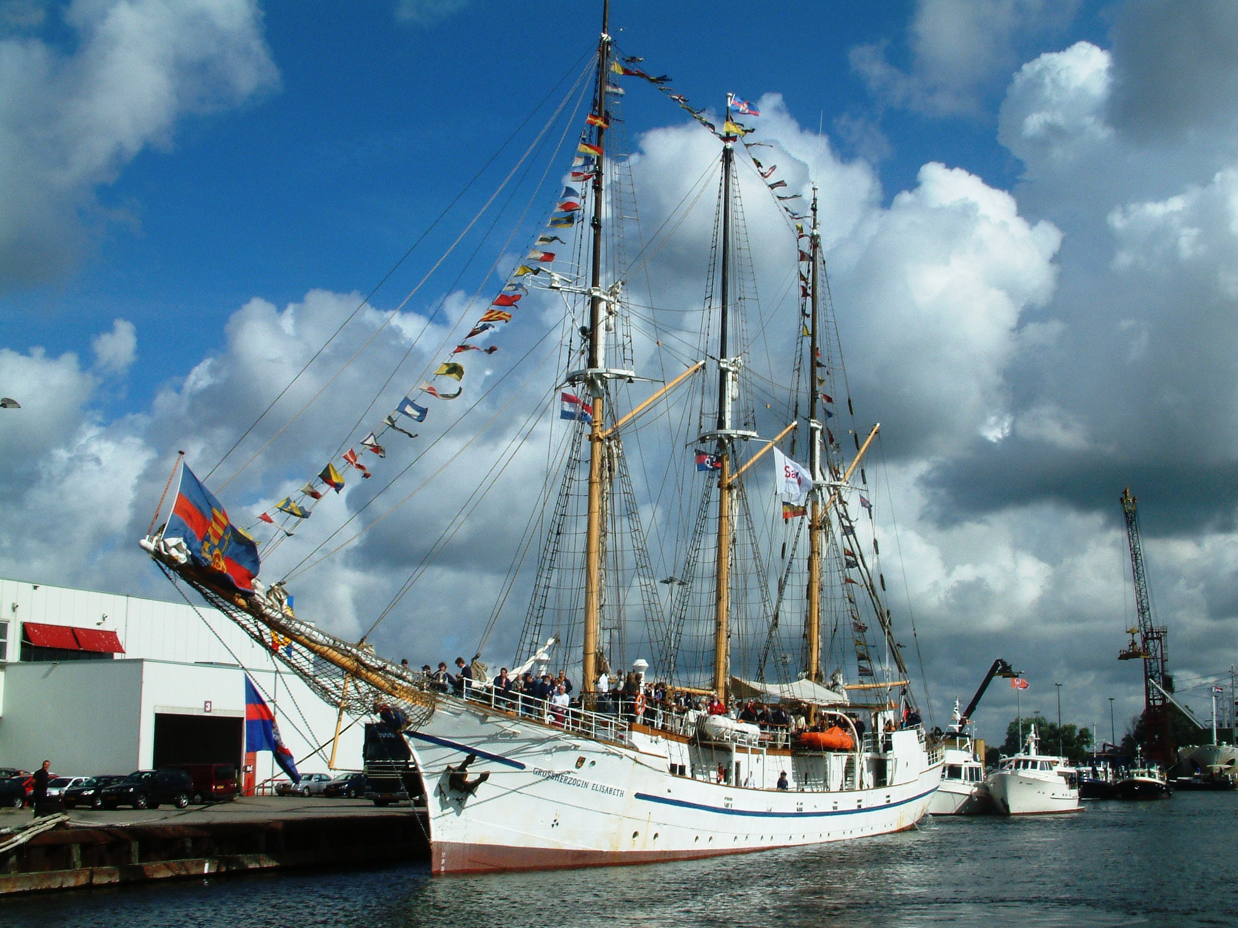 Een foto van de Sail-in parade van Sail Amsterdam 2010.